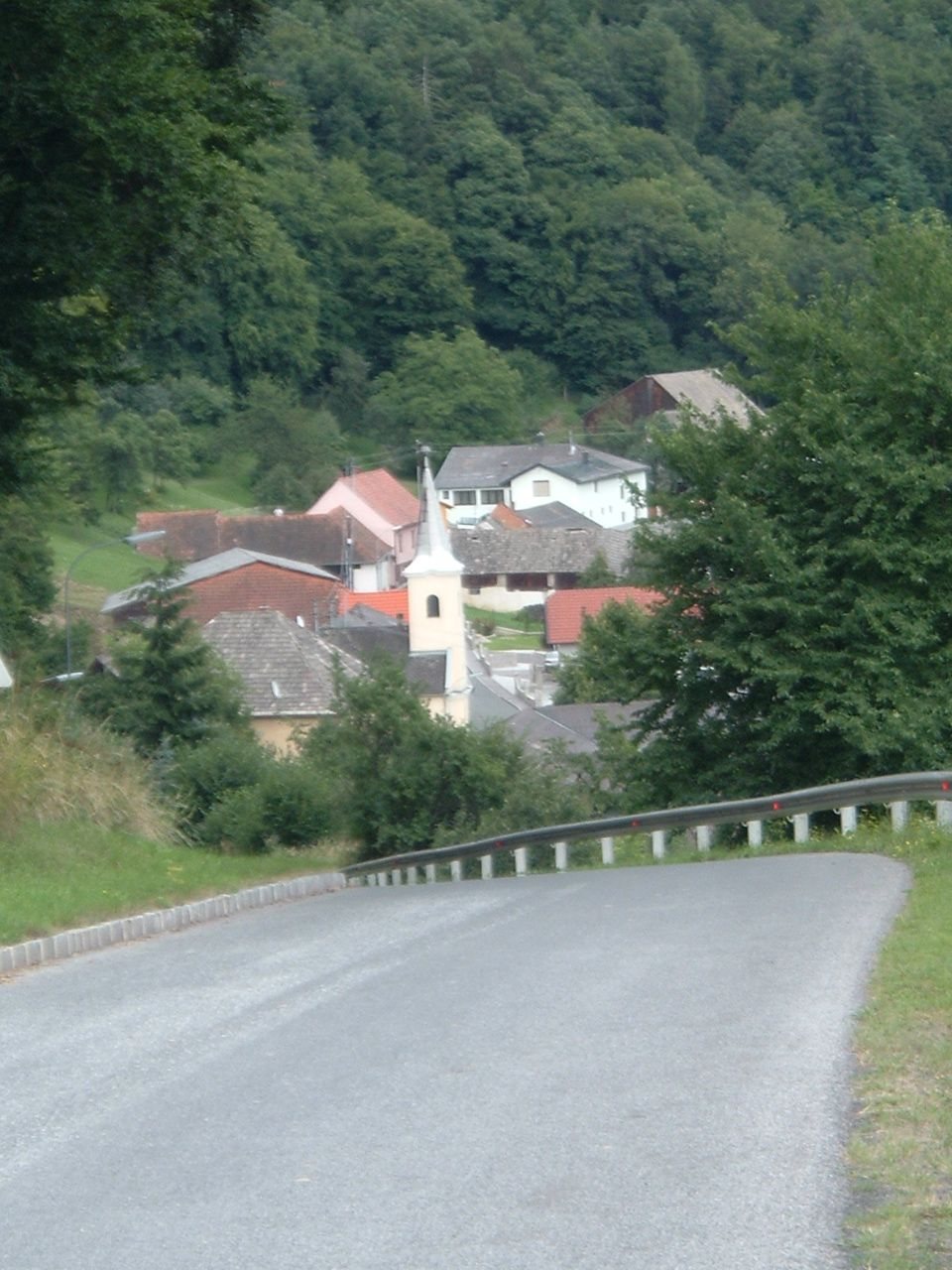 Glashütten bei Schlaining, Burgenland, Austria